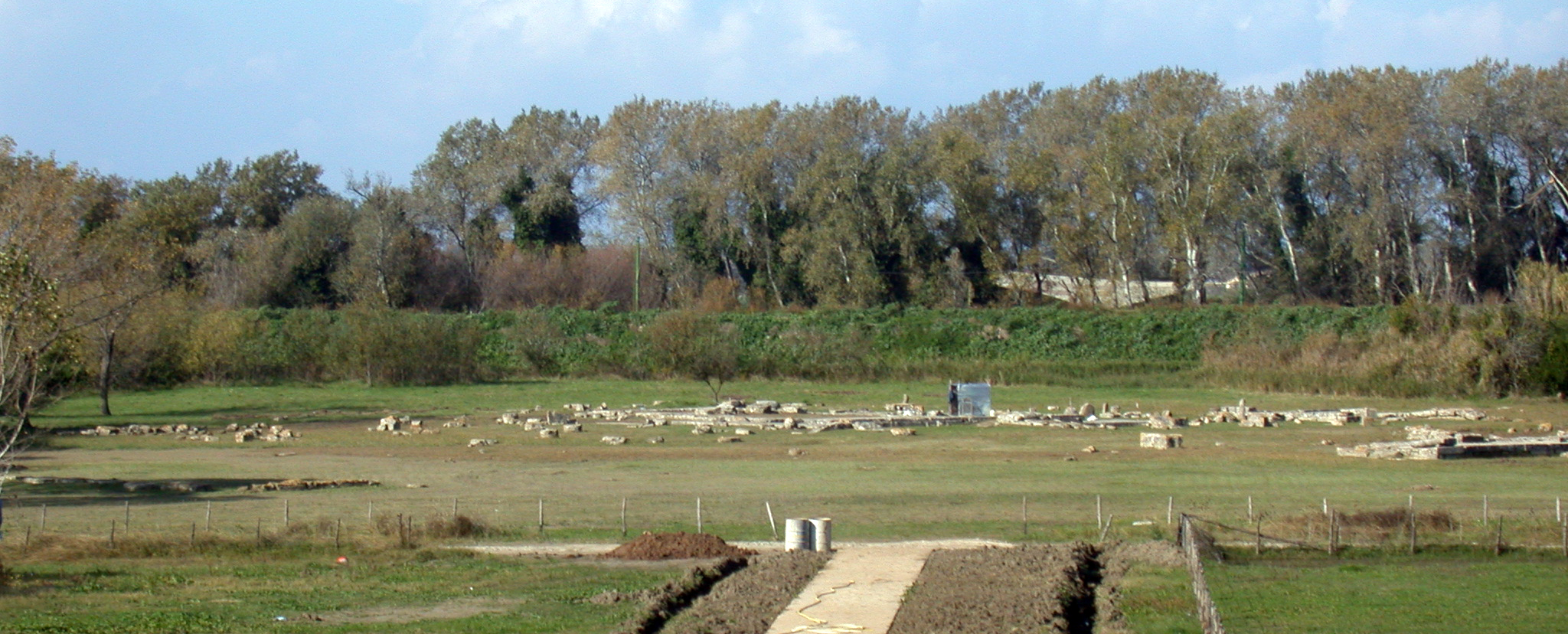 Italia, comune di Capaccio-Paestum in provincia di Salerno, resti del santuario di Hera Argiva alla foce del Sele